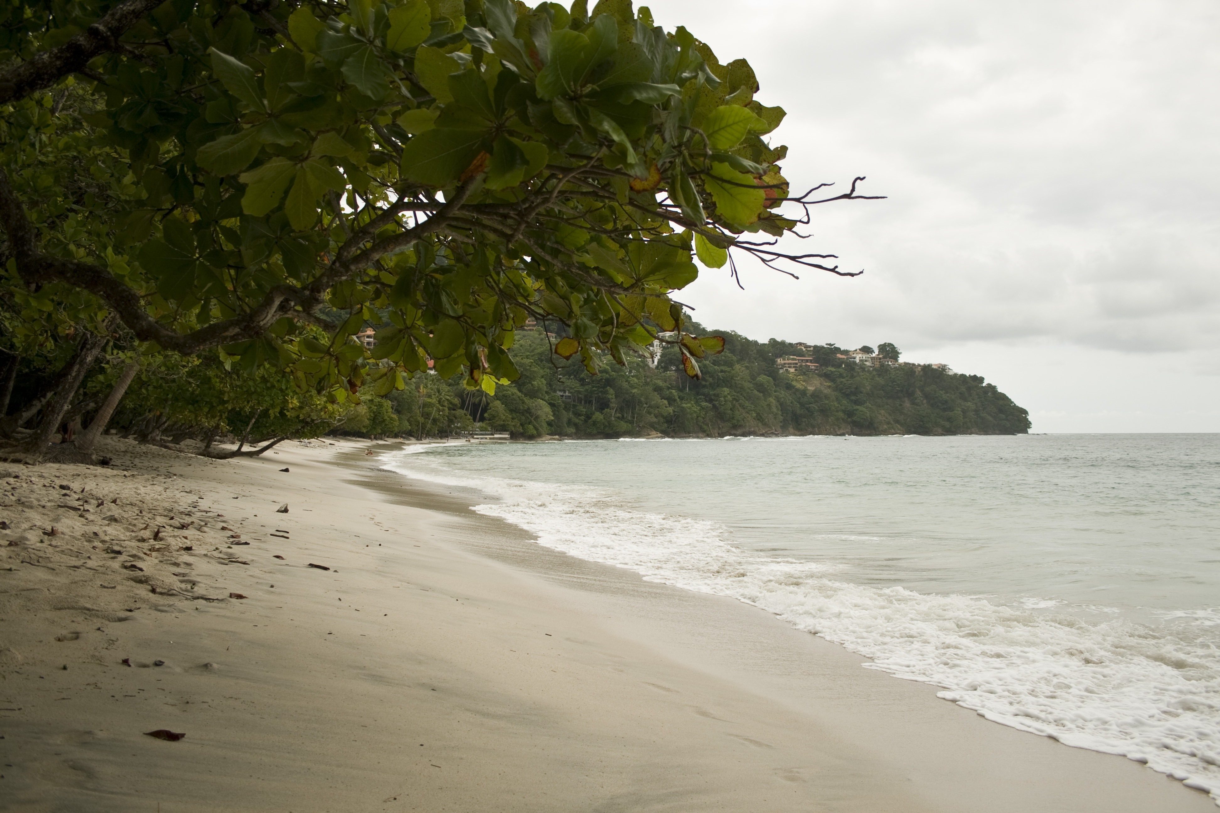 Punta Leona. Cantón de Garabito, Provincia de Puntarenas, Costa Rica.